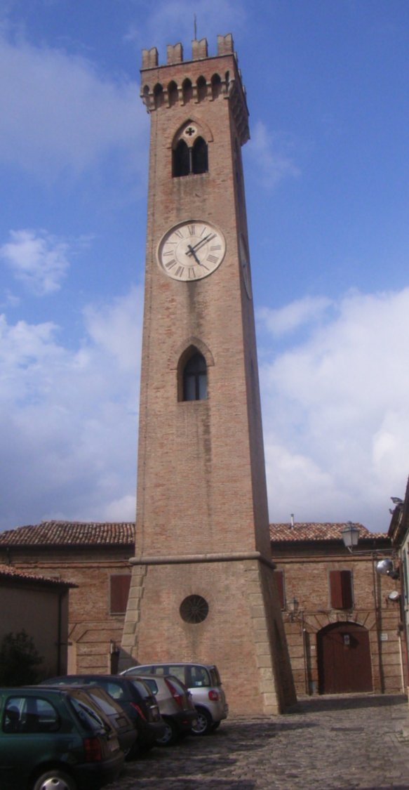 La urba turo (sonorilturo) en Santarcangelo di Romagna, konstruita en 1893, 24 metrojn alta. Ornamas ĝin fera figuro de ĉefanĝelo Mikaelo, kiu jam ornamis antaŭan turon, falintan. Foto el 2007.